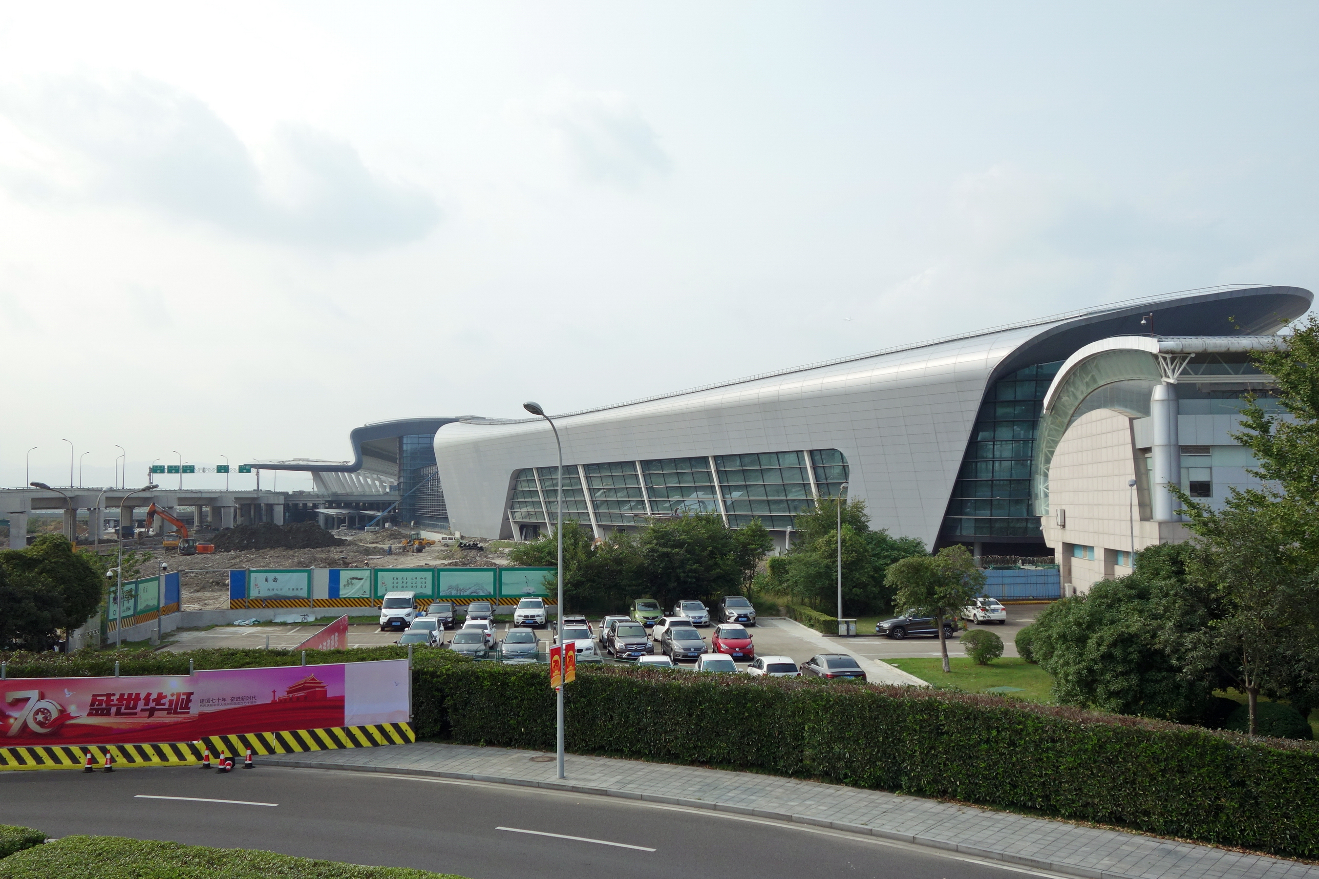 宁波栎社国际机场三期扩建工程正在新建的T2航站楼